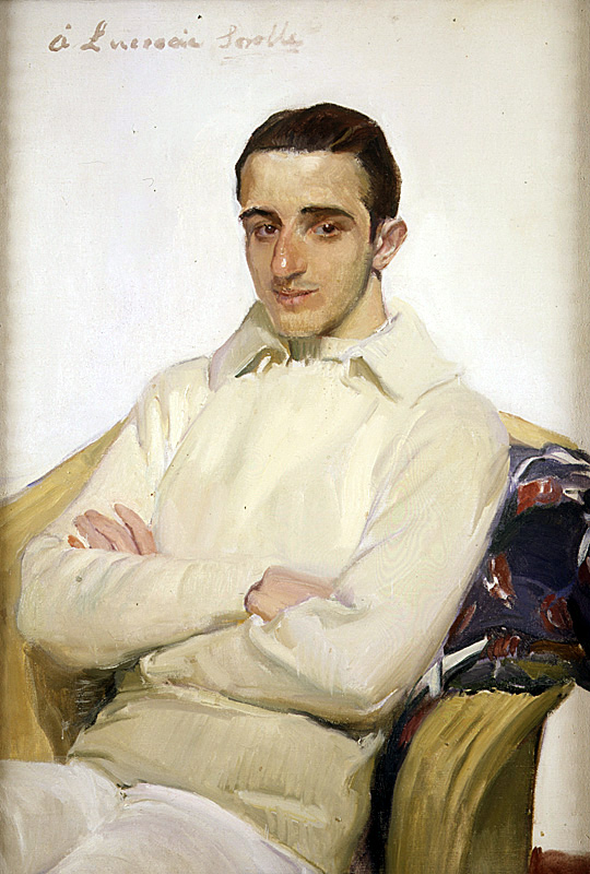 Retrato del pintor, escultor y arquitecto español José Luis Benlliure López de Arana (1898-1981).